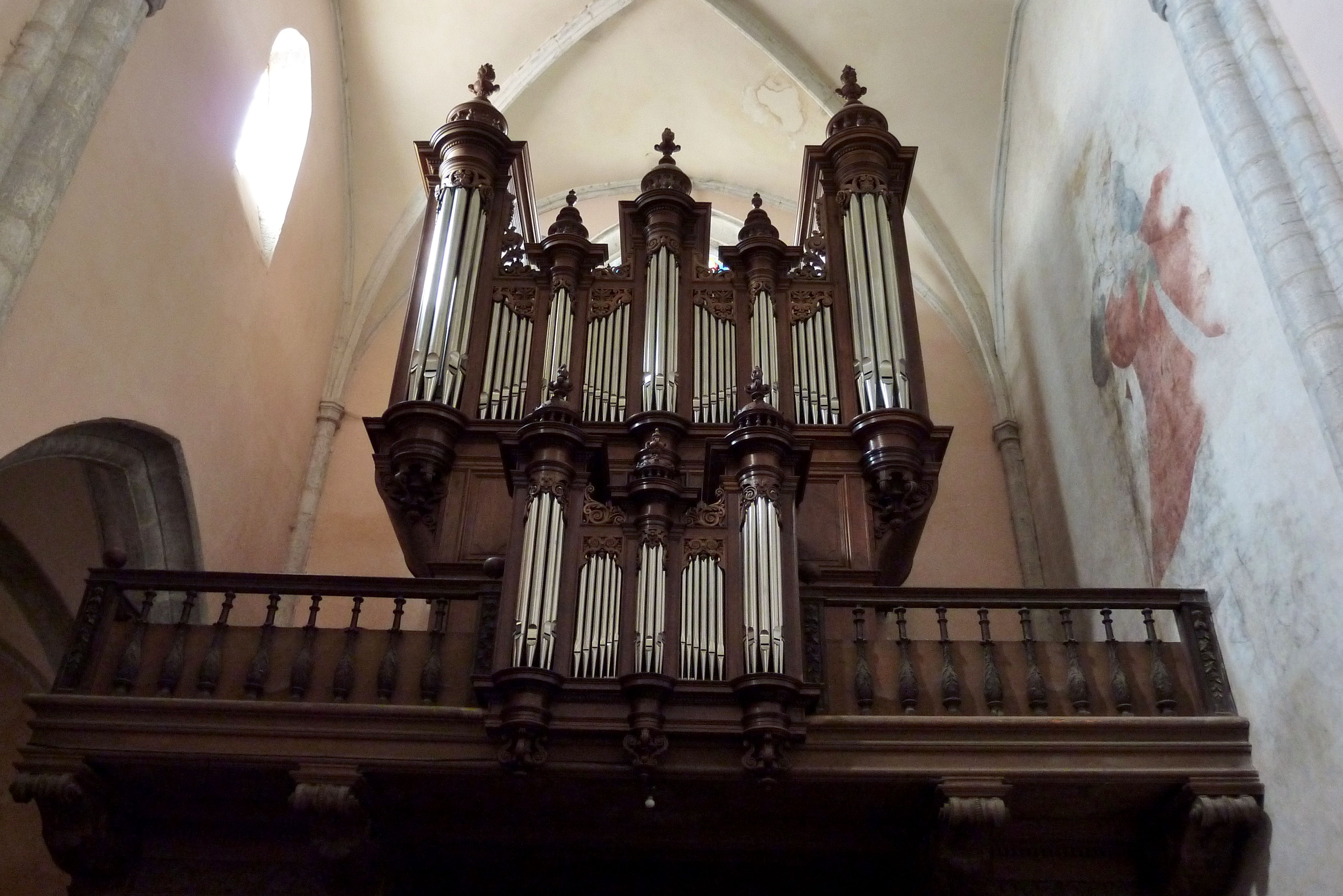 Ehemalige Kollegiatskirche St-Hippolyte in Poligny im Département Jura in der Region Franche-Comté(Frankreich), Orgel von Cavaillé-Coll (1858/59) in einem Orgelprospekt von 1687